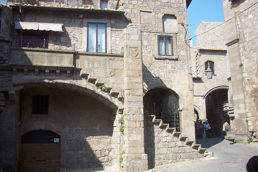 Viterbo, San Pellegrino. Foto personale